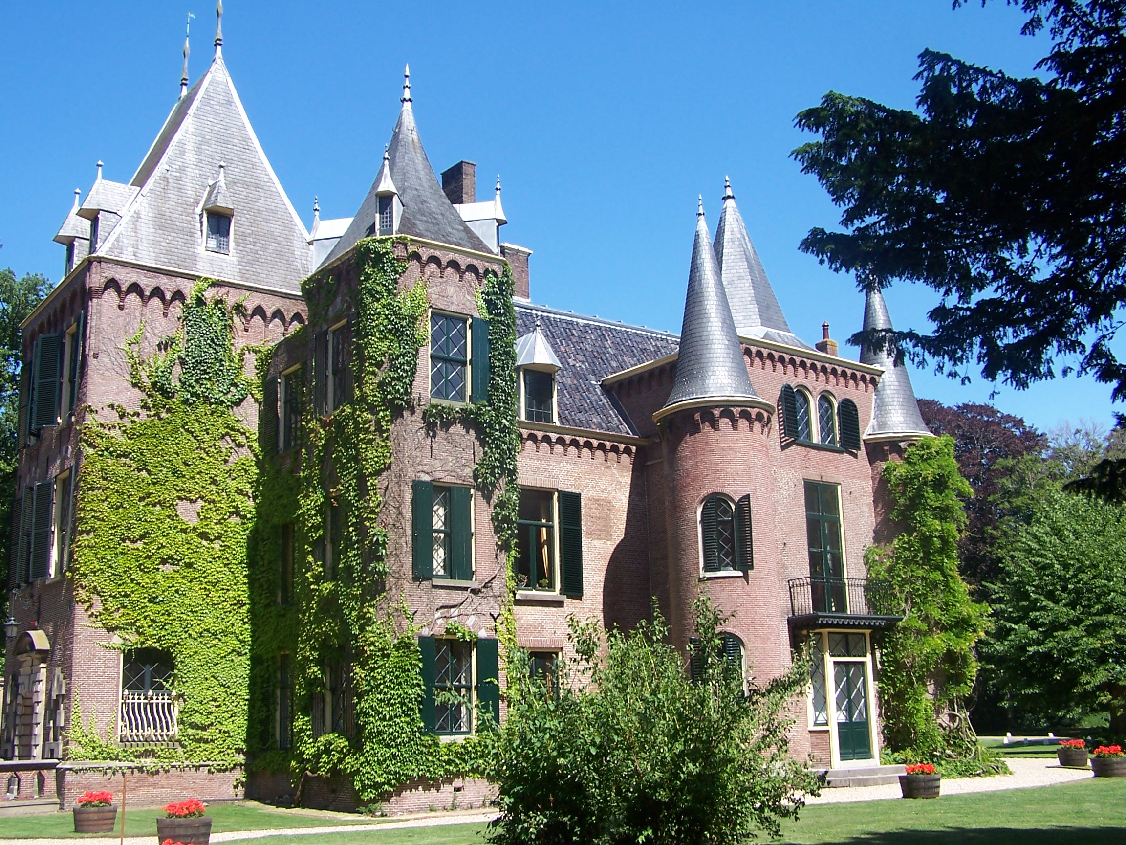 Foto van Kasteel Keukenhof gemaakt op 10 juli 2006